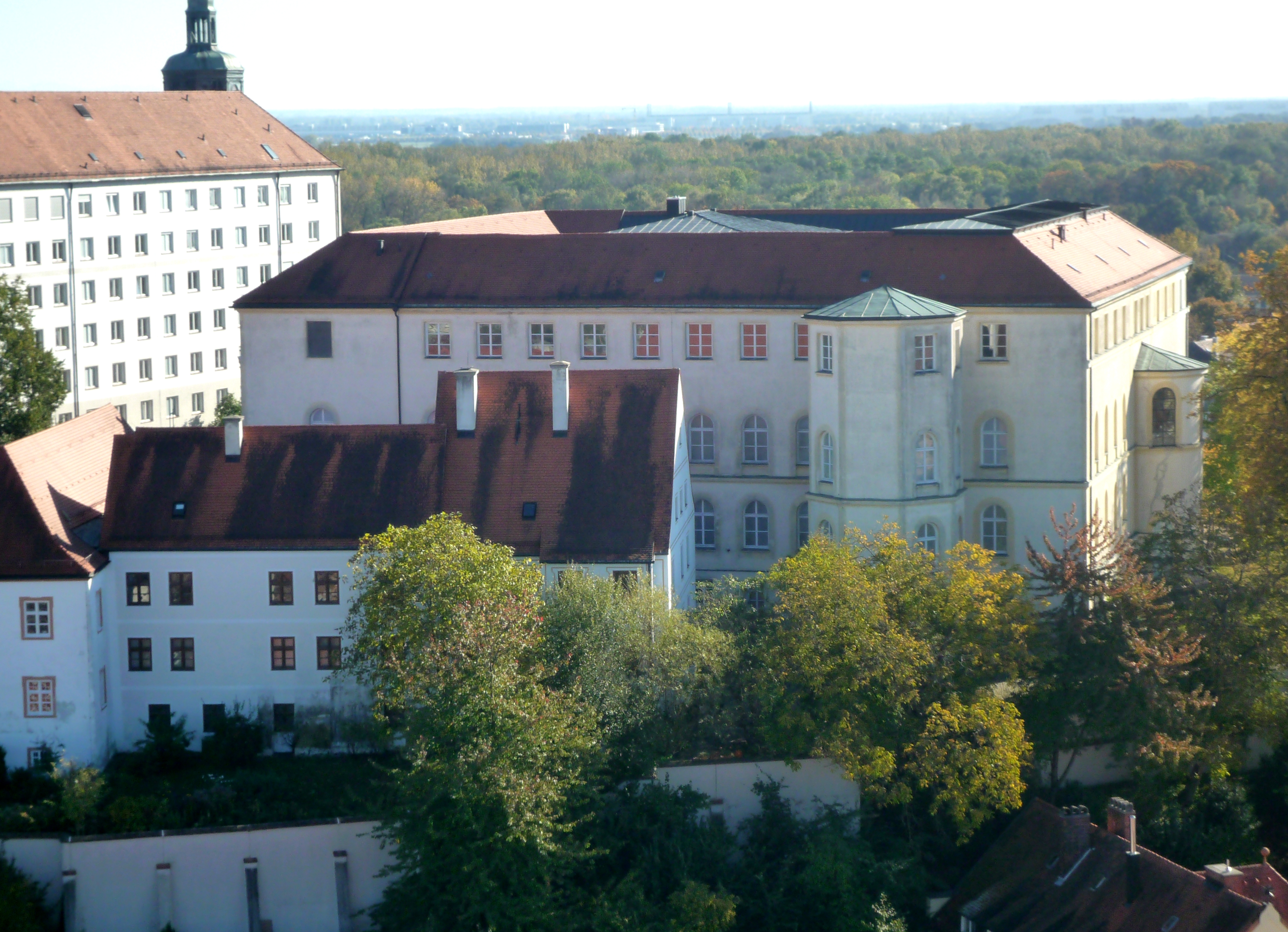 Gebäude des Diözesanmuseums auf dem Domberg in Freising (Domberg 21); Aufgenommen vom Turm der Stadtpfarrkirche St. Georg